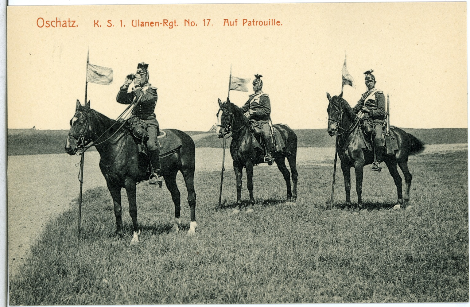 Oschatz; 1. Königlich Sächsisches Ulanen-Regiment Nr. 17 - Auf Patrouille This postcard is from publisher Brück & Sohn in Meißen ( This postcard has a unique number 14763 and is available in a higher resolution at the publisher. This images was uploaded in a cooperation project between Wikipedians and the publisher.